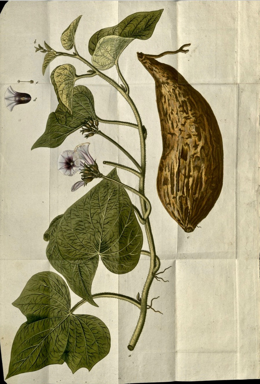 Süßkartoffel. Franz Joseph Märter: Naturgeschichte der Bataten (…) Schaumburg, Wien 1797.